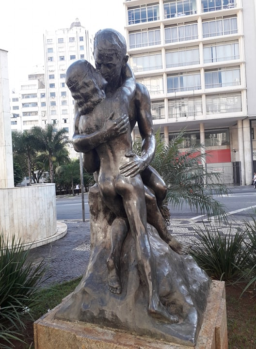 O Idílio ou Beijo Eterno, 1922 - escultura em bronze, de Willian Zadig. Largo São Francisco, São Paulo.